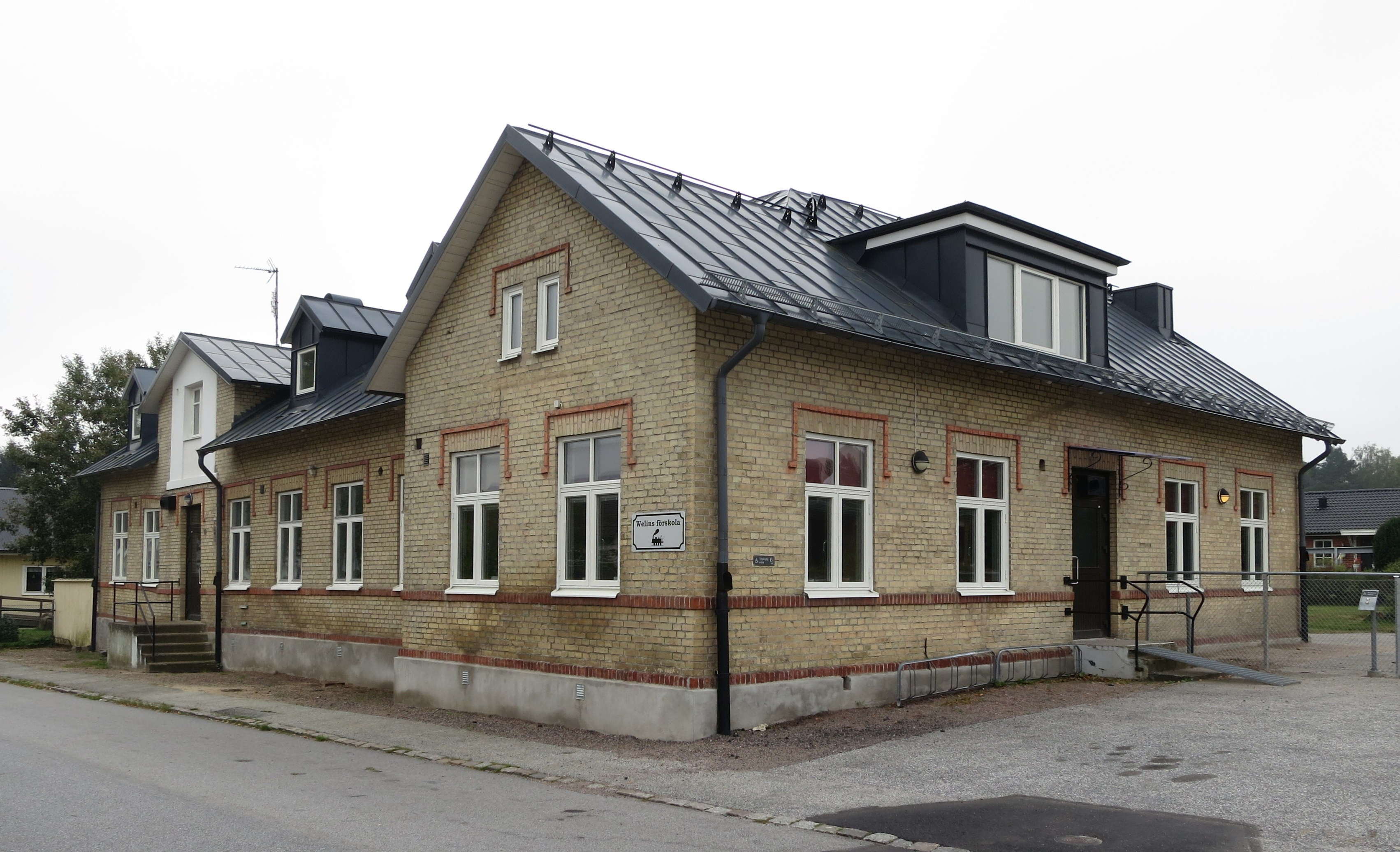 Järnvägsstationen i Genarp, sedermera förskola